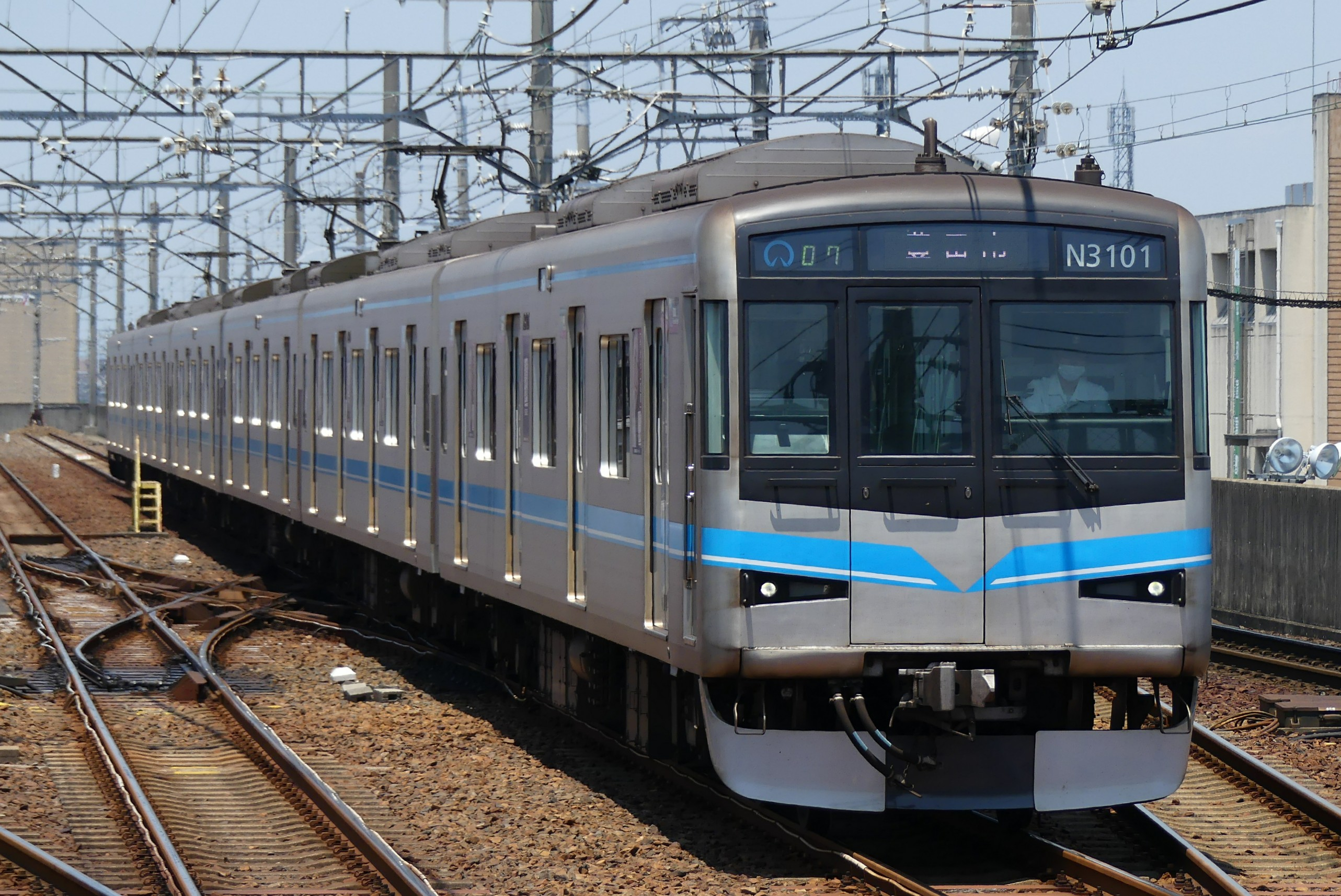 N3000形第1編成